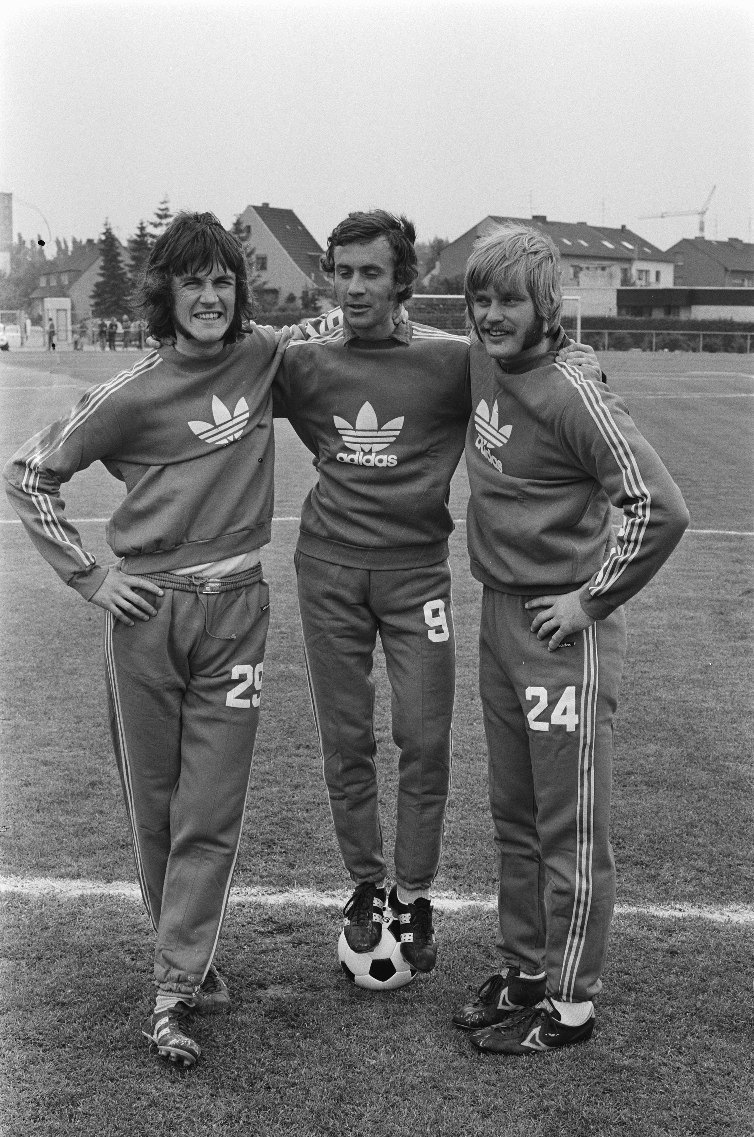 Collectie / Archief : Fotocollectie Anefo Reportage / Serie : [ onbekend ] Beschrijving : Selectie Zweedse elftal voor WK voetbal in trainingskamp in Mönchen Gladblach; v.l.n.r. Edstrom, Kindvall, Hellstrom Datum : 11 juni 1974 Trefwoorden : sport, voetbal Persoonsnaam : Kindvall, Ove Fotograaf : Verhoeff, Bert / Anefo Auteursrechthebbende : Nationaal Archief Materiaalsoort : Negatief (zwart/wit) Nummer archiefinventaris : bekijk toegang 2.24.01.05 Bestanddeelnummer : 927-2492